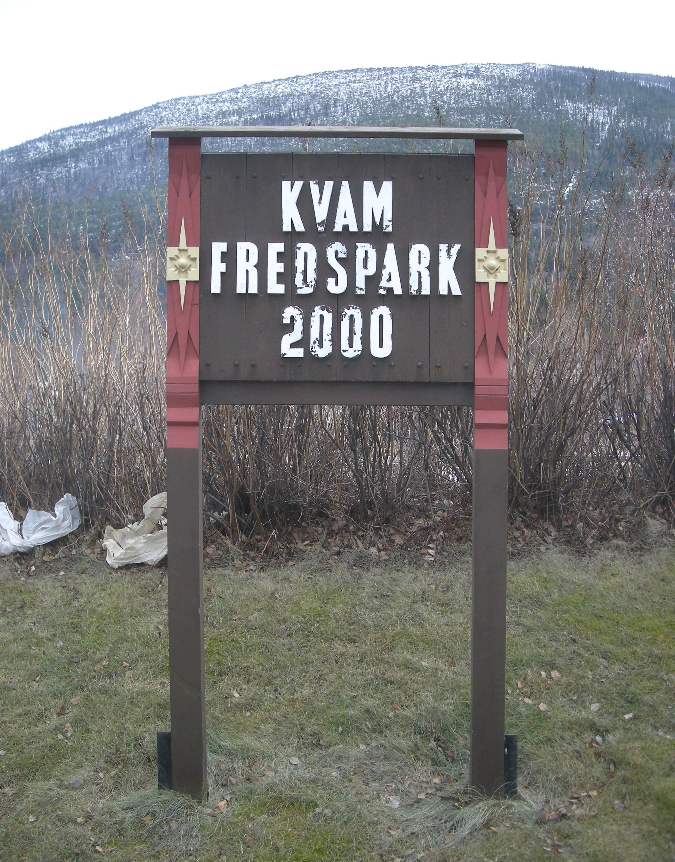 Kvam fredspark, Nord-Fron